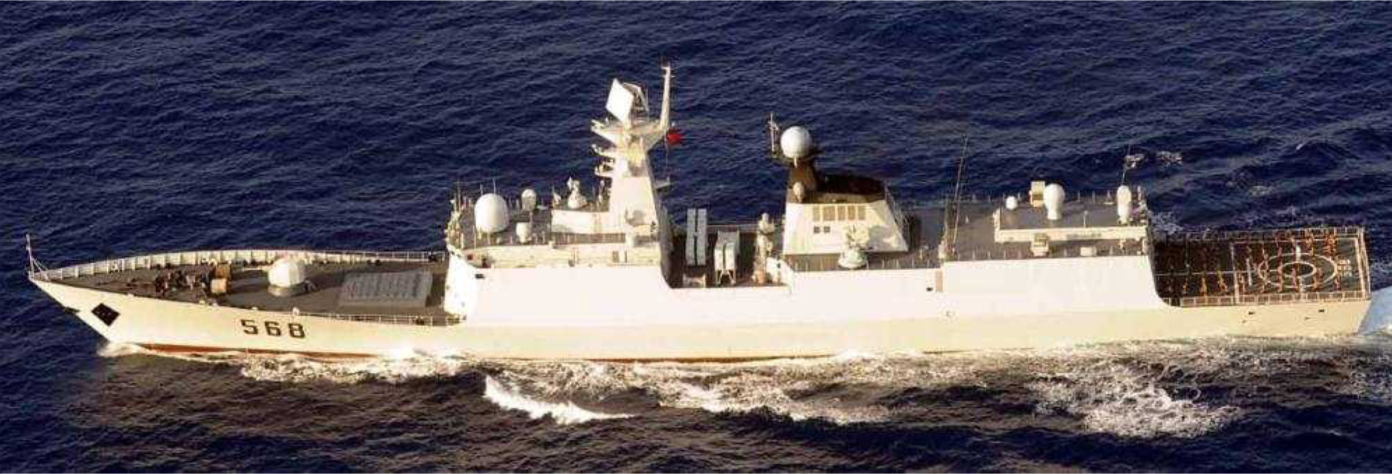 ５月６日（日）午前６時頃、海上自衛隊第５航空群（那覇）所属「Ｐ－３Ｃ」が、沖縄本島の南西約６５０ｋｍの海域を太平洋に向けて南東進する中国海軍のルーヤンⅠ級ミサイル駆逐艦２隻、ジャンカイⅡ級フリゲート２隻及びユージャオ級揚陸艦１隻の合計５隻を確認した。このうち、ルーヤンⅠ級ミサイル駆逐艦及びユージャオ級揚陸艦は、海上自衛隊において初めて確認したものである。また、沖縄本島南西約６１０ｋｍの海域において艦載ヘリコプターの飛行及び陣形運動を行っていたことが確認されている。